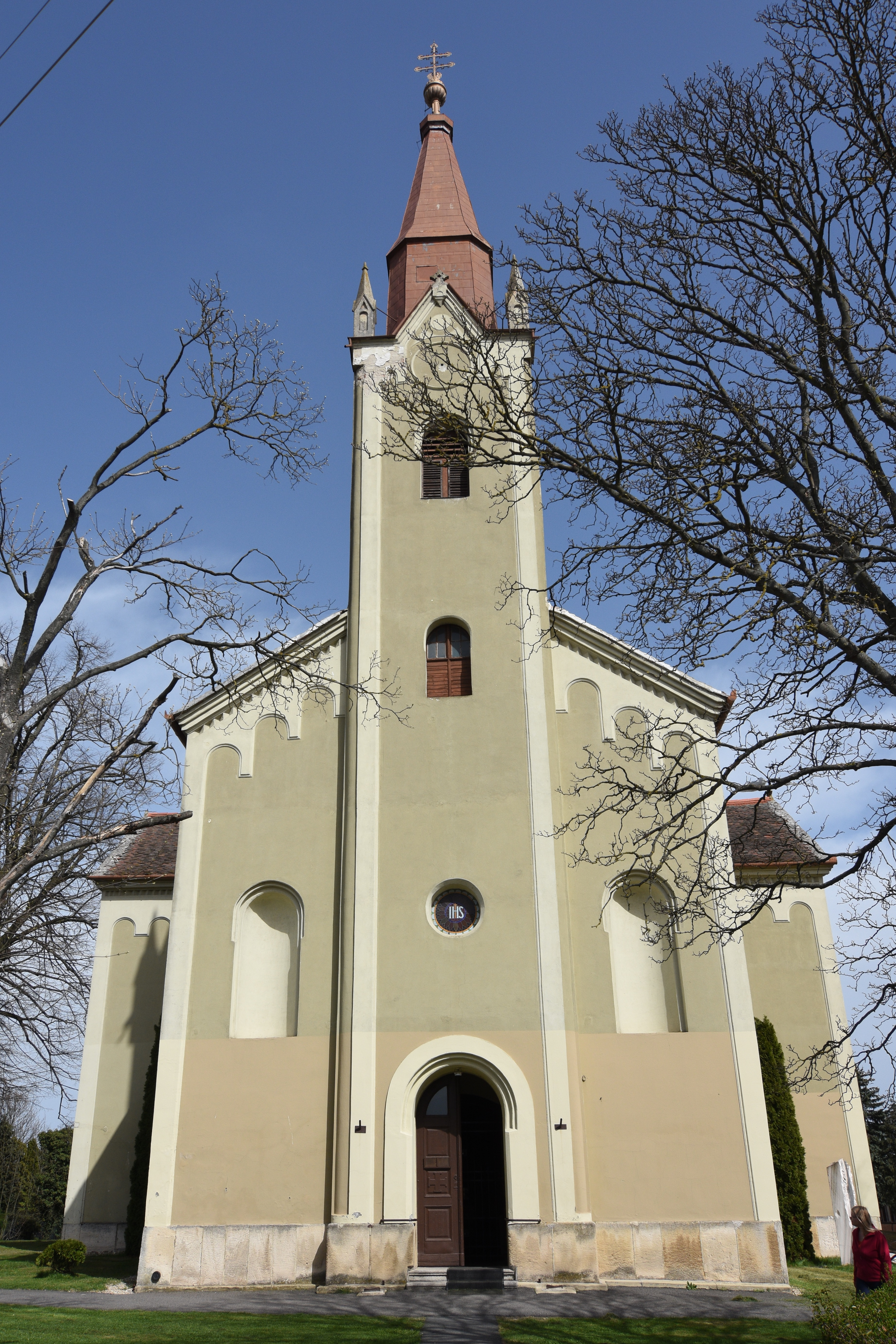 Kirche Roman Catholic Church in Vép